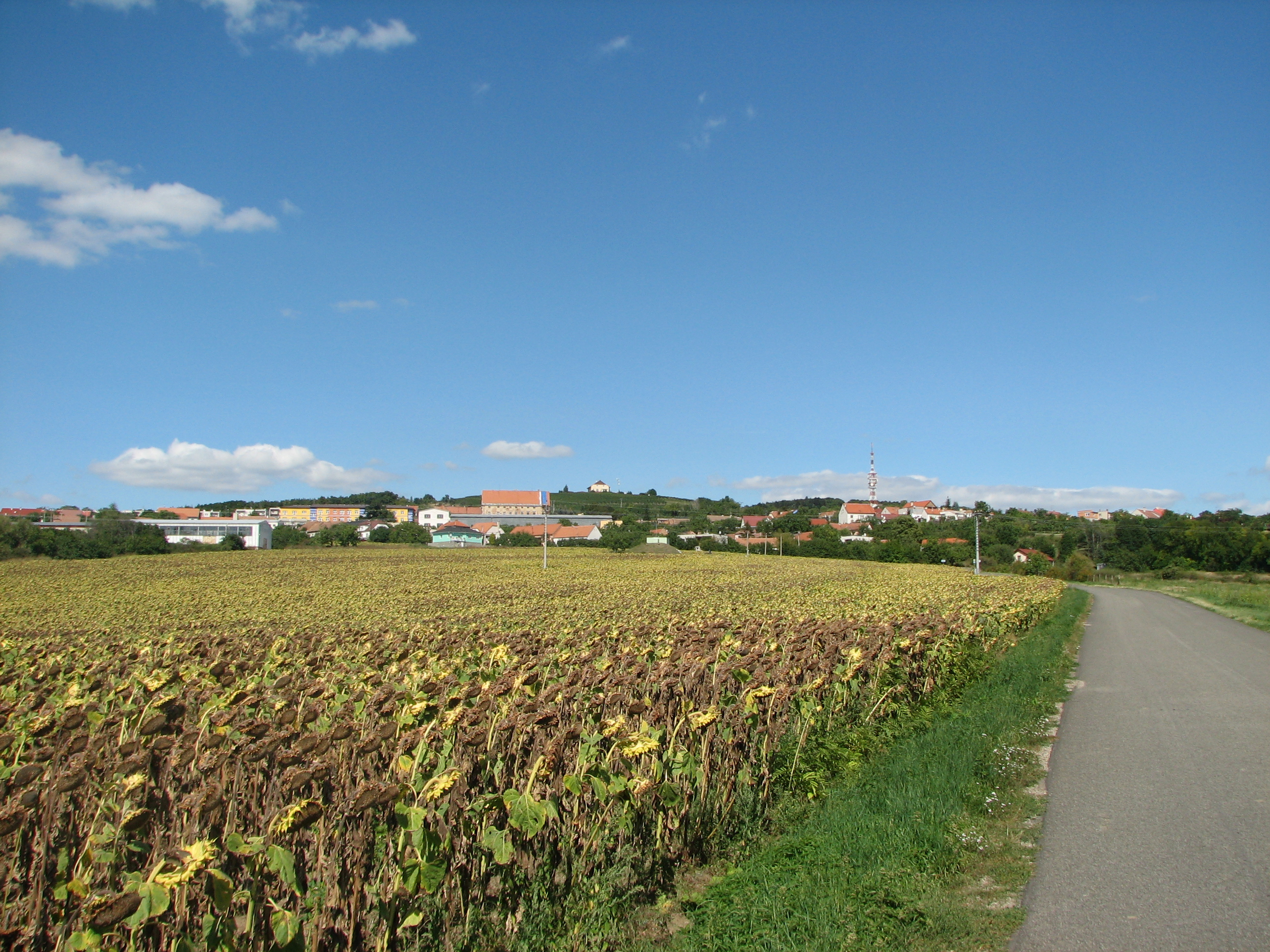 Strážovice - pohled od Stavěšic